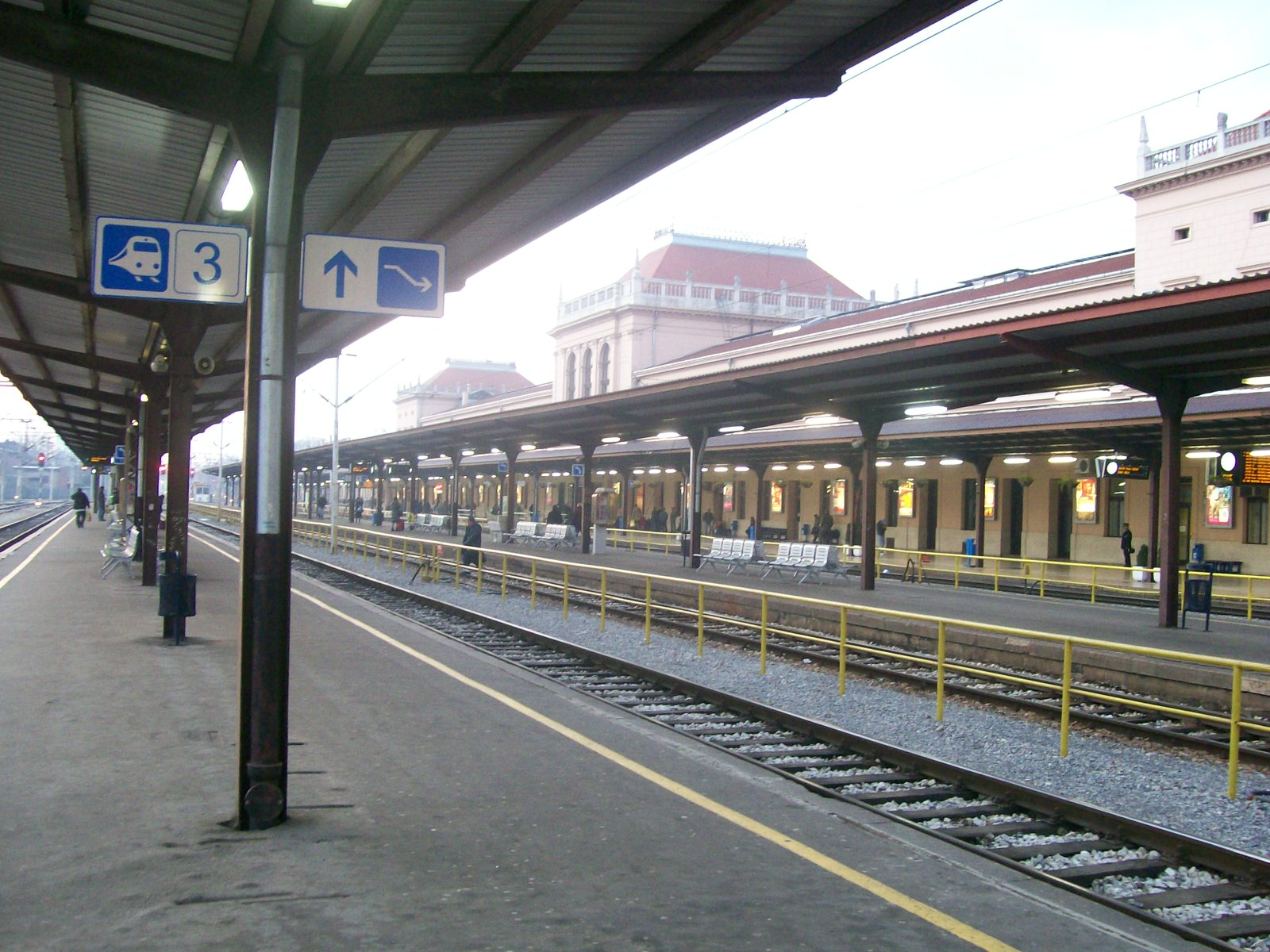 Glavni kolodvor Zagreb